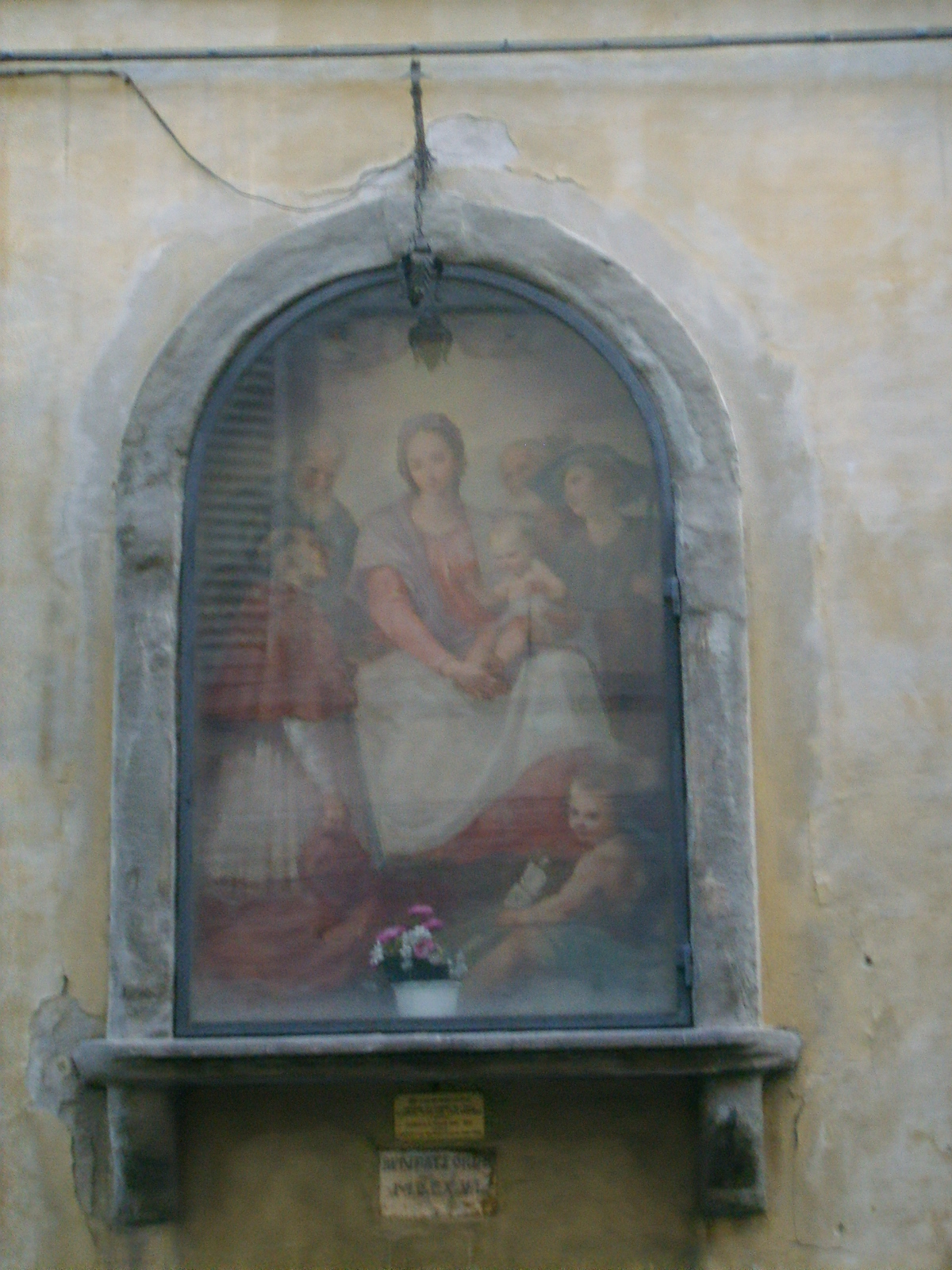 Giovanni_da_San_Giovanni,_Tabernacolo_Via_Faenza in Via Faenza in Florence, Italy